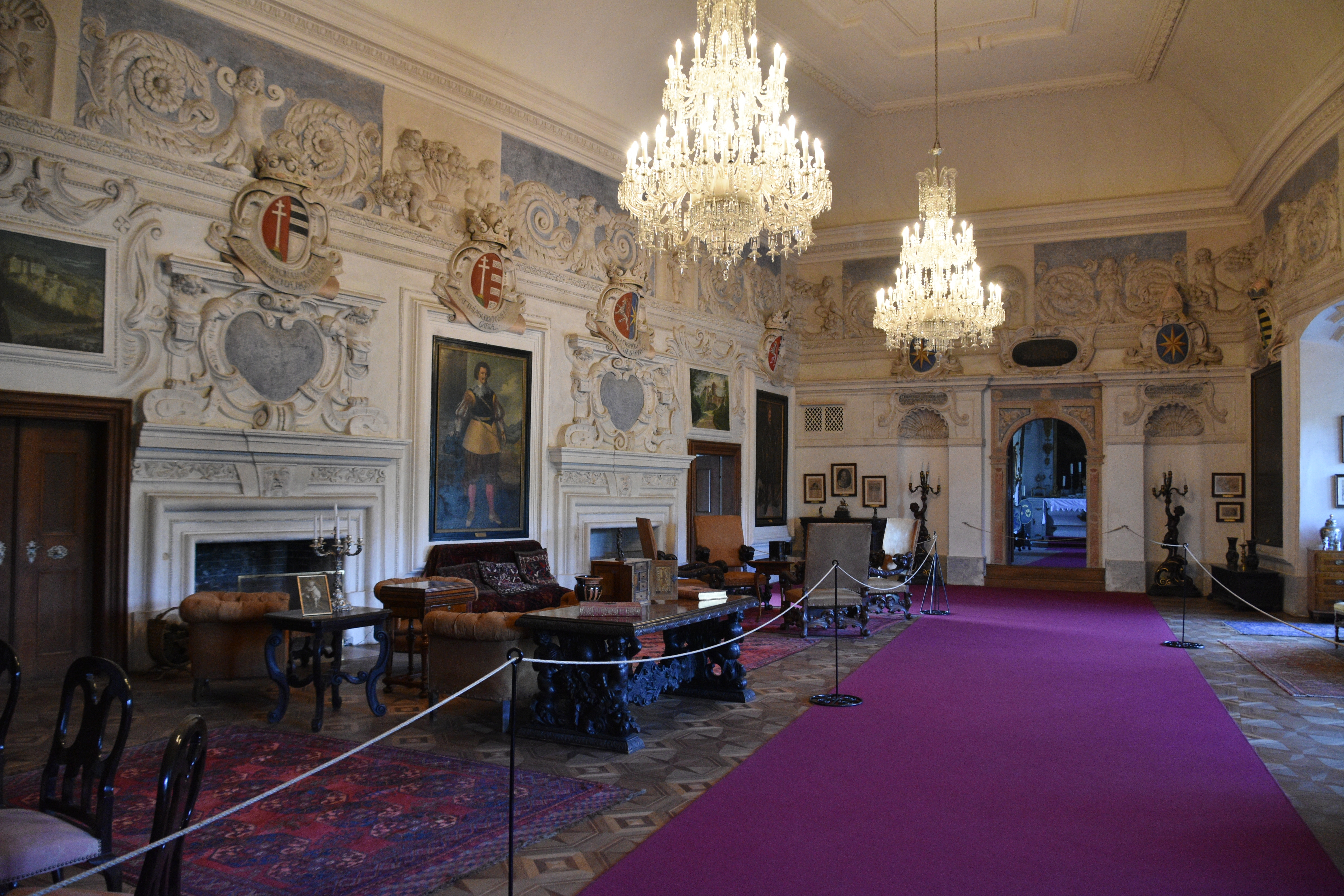 Cesky Sternberk Castle, interior (2)